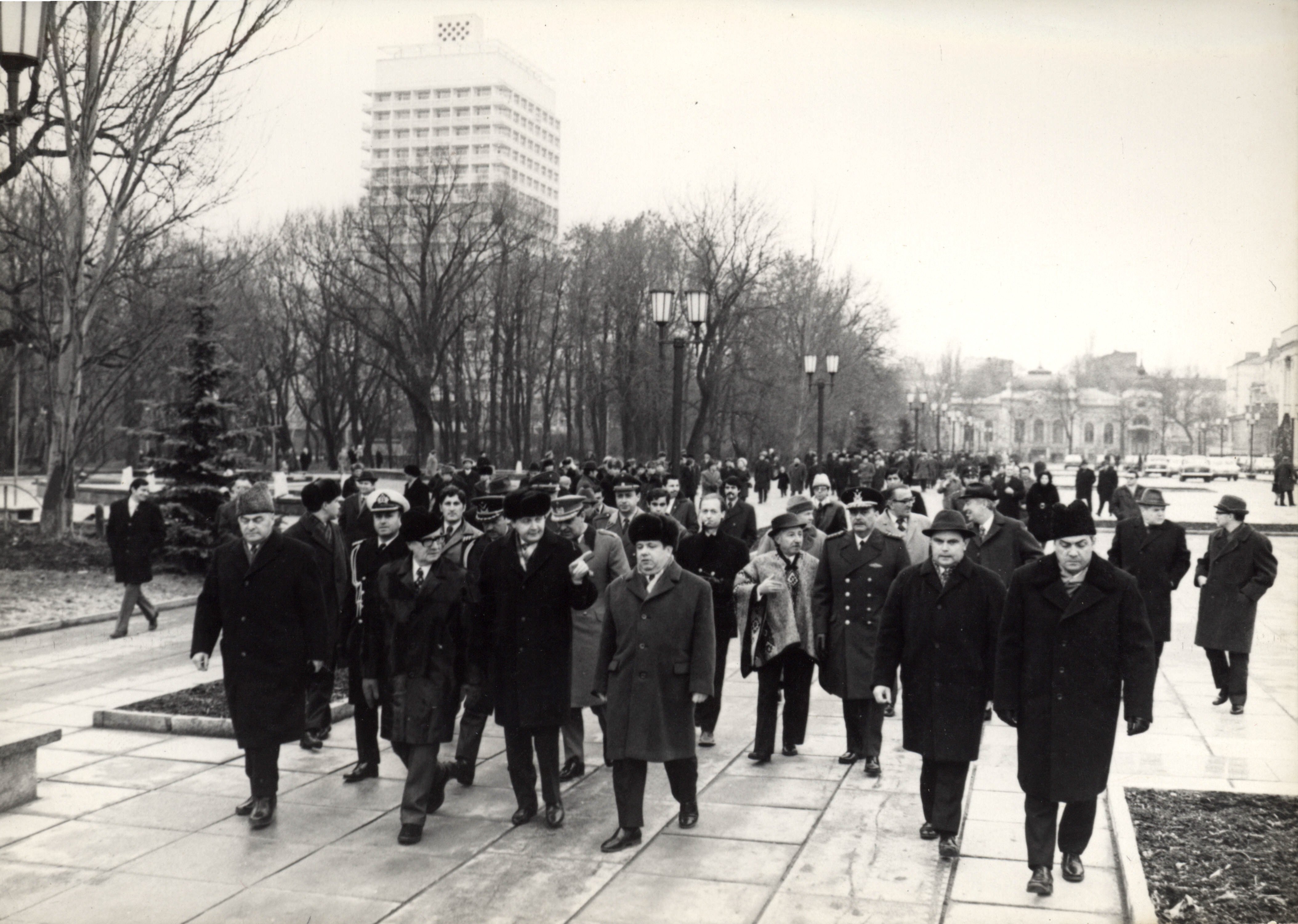 Visita de Salvador Allende a Kiev. Luis Corvalán